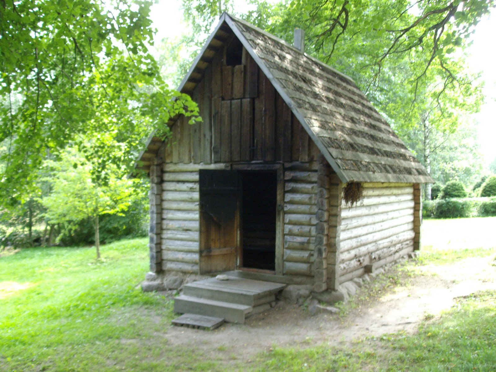 Koolitalu suitsusaun Põlva talurahvamuuseumis